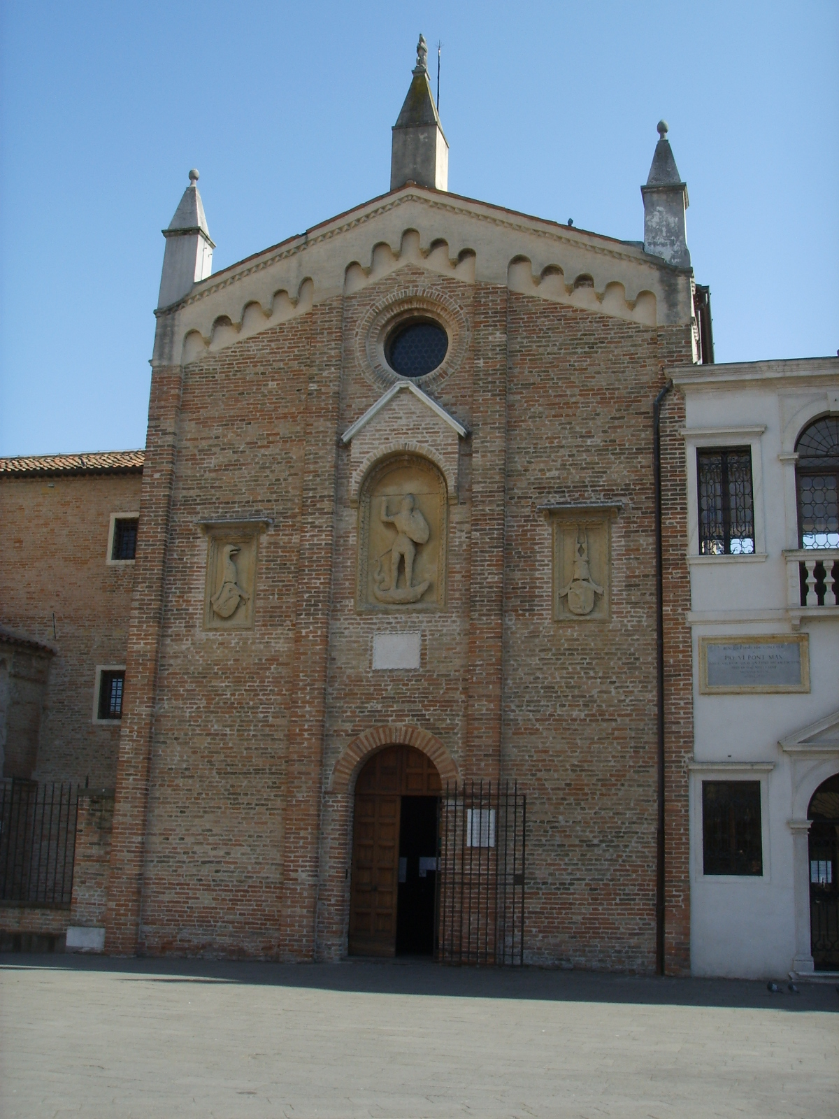 Padova, oratorio di san giorgio